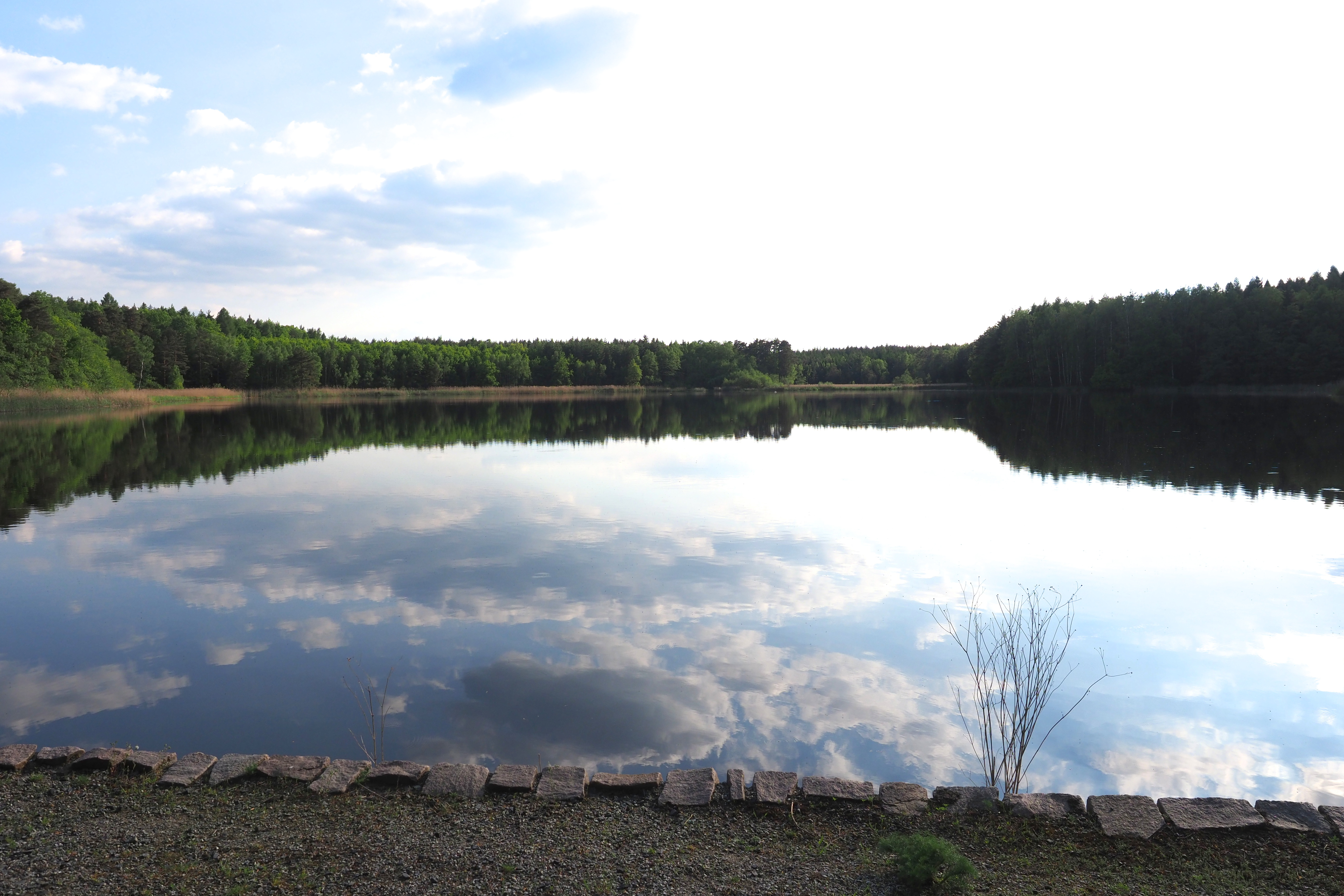 Naturschutzgebiet Oberer Altenteich